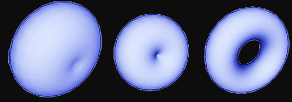 2-toro